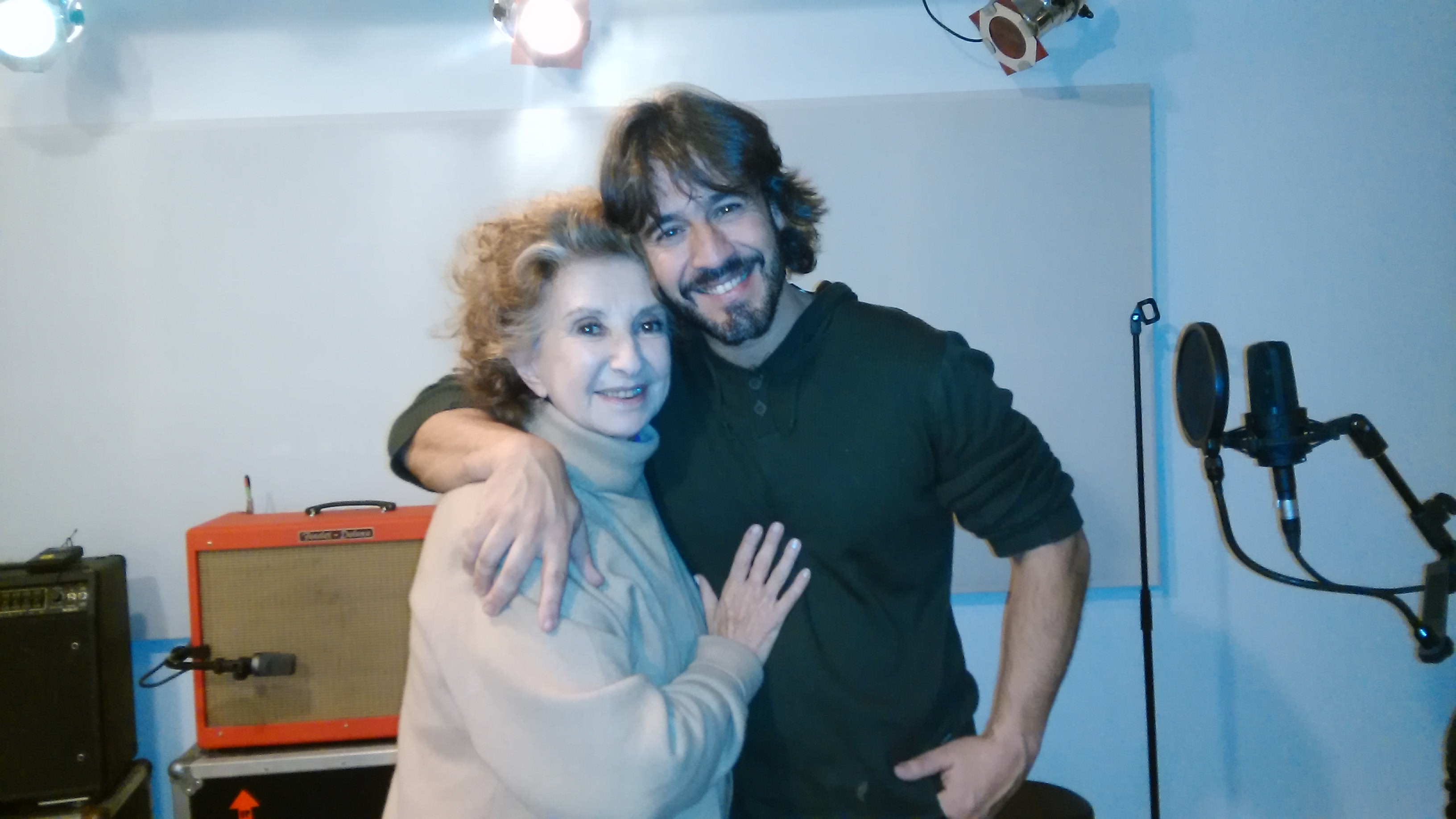 Francisco Pesqueira publicó un CD Doble con su libro de poemas, en el CD participaron numerosas personalidades de la cultura